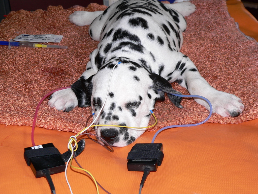 Dalmatinerwelpe, Audiometrie